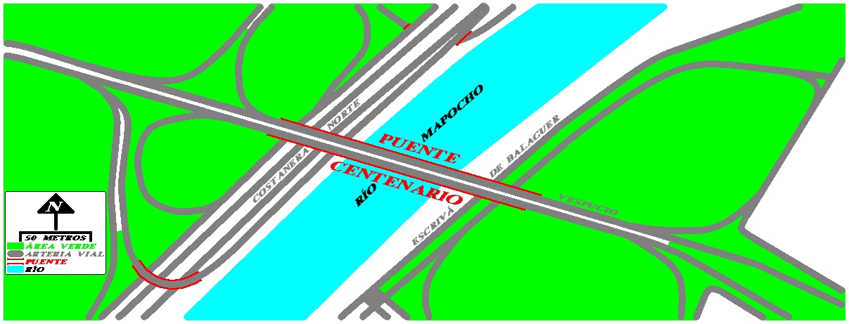 Plano de entorno del Puente Centenario de Santiago de Chile.